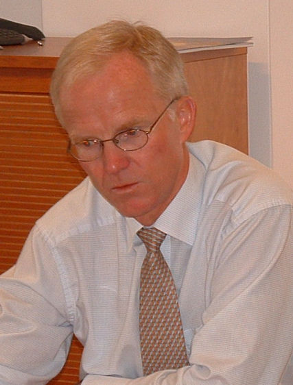 Olav Fjell, konsernsjef i Statoil 1999-2003 Olav Fjell President in Statiol 1999-2003